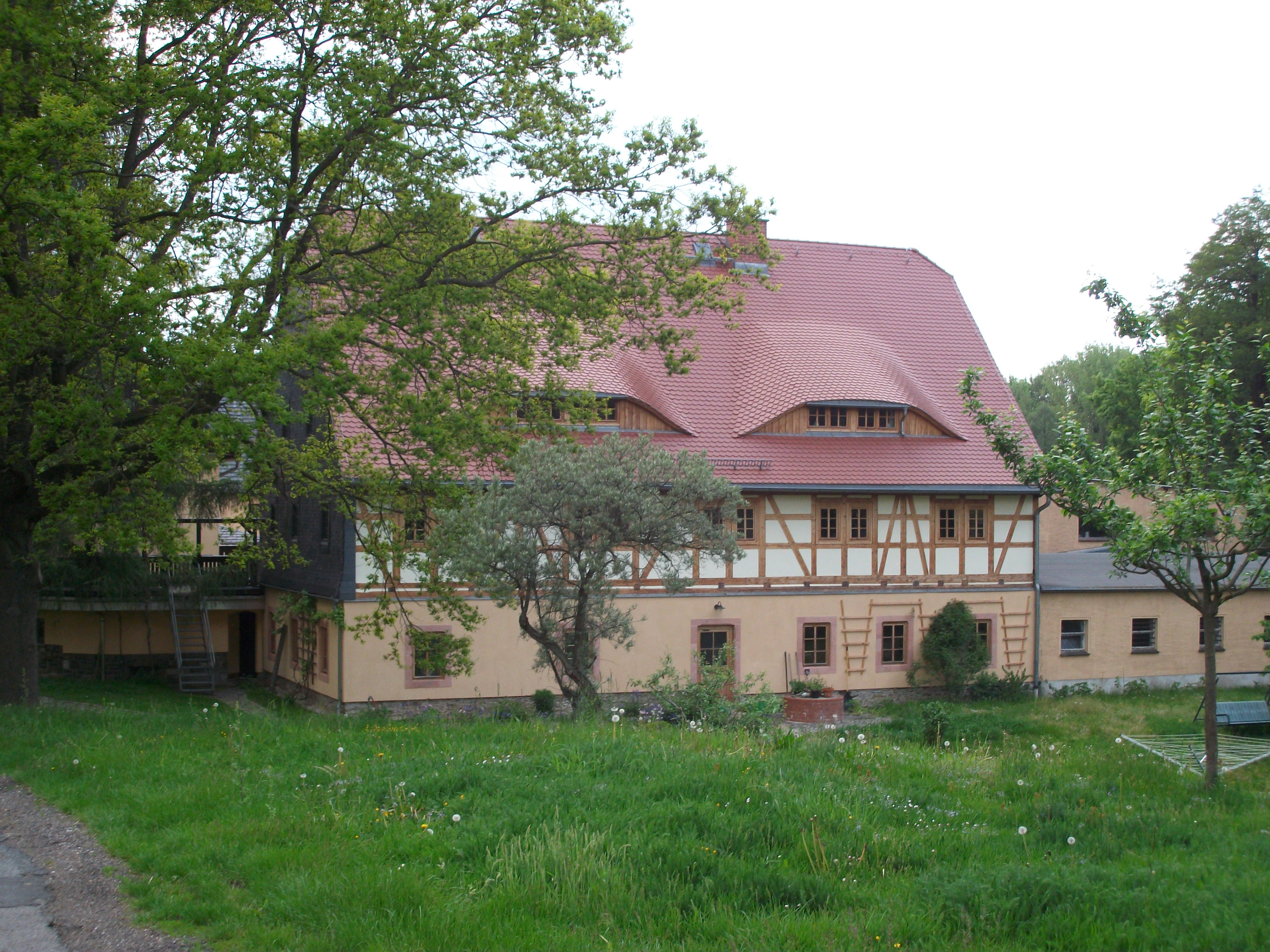 Oberwinkel, Am Park 5